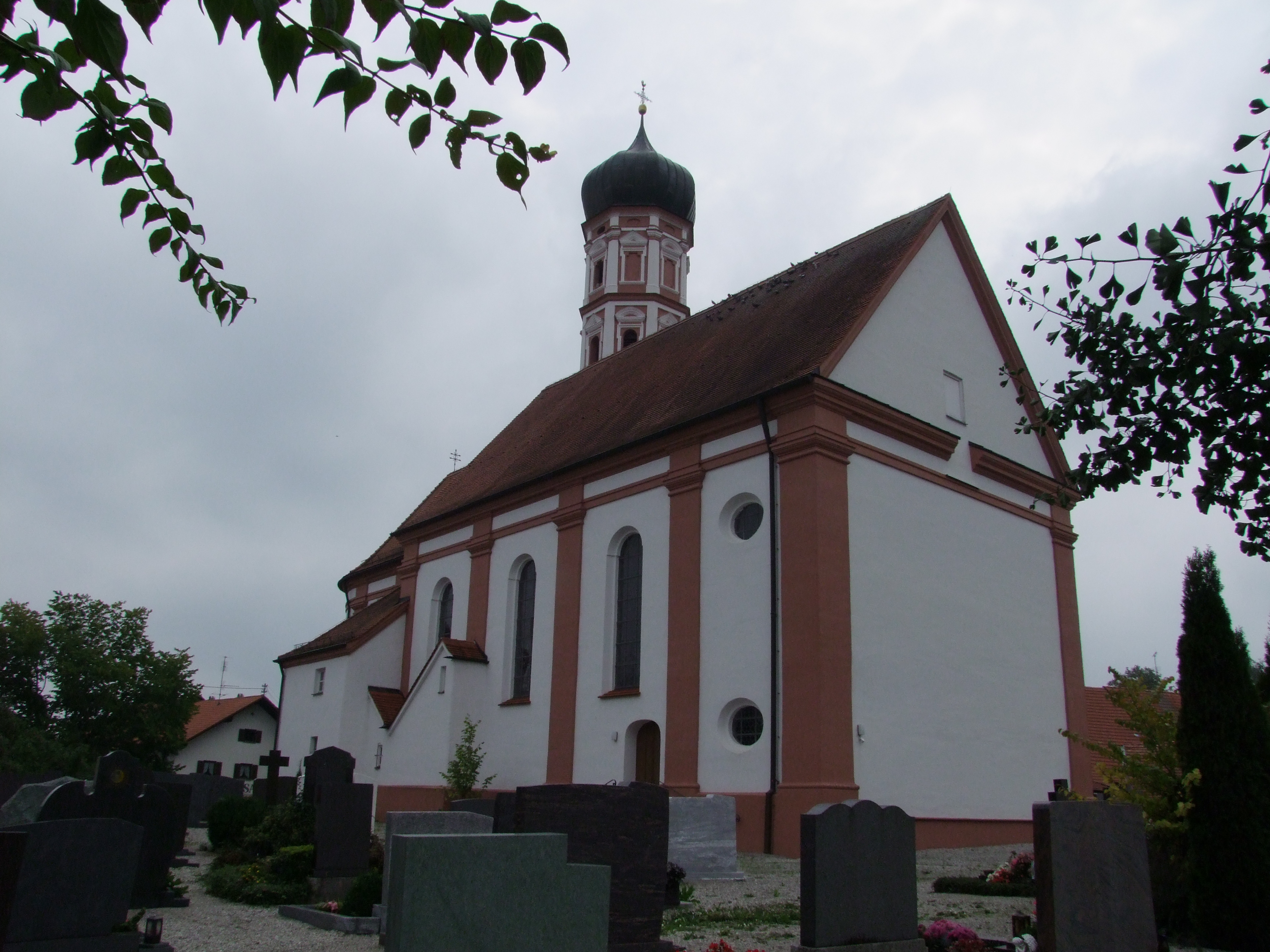 St. Michael in Stockach in Schwaben